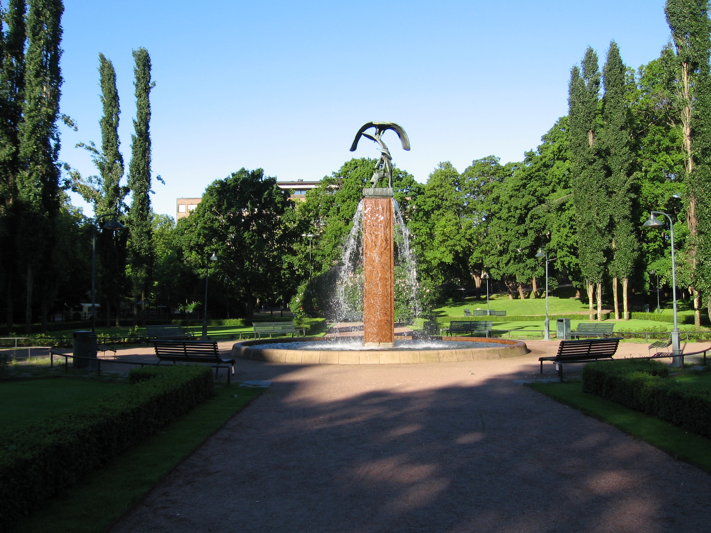 Kotkan Sibeliuksenpuisto.